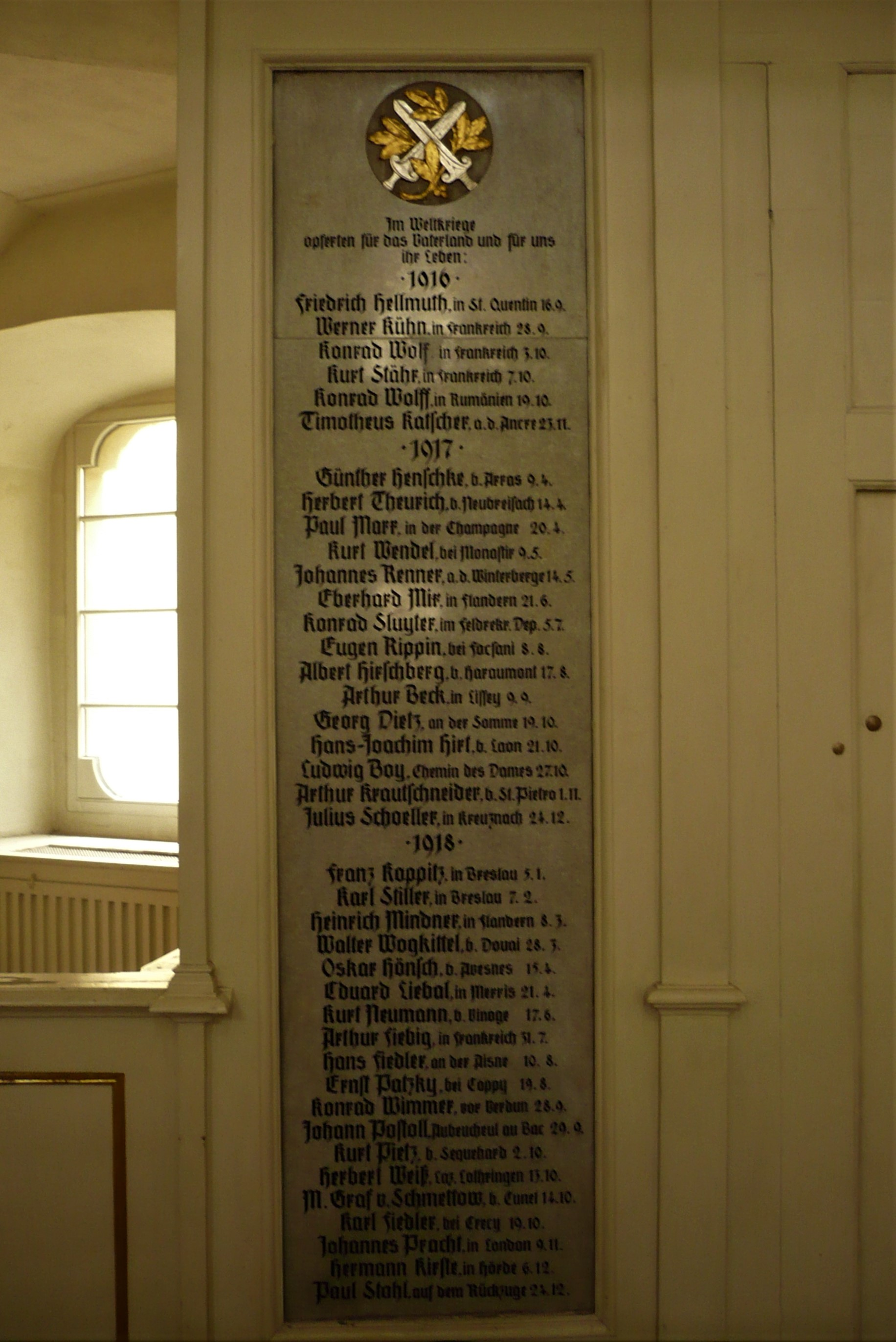 Kościół Opatrzności Bożej we Wrocławiu